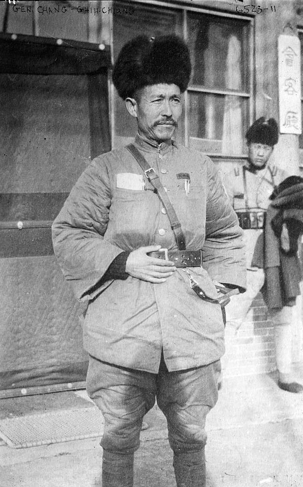 張之江, 字紫岷 (1882 - 1966)